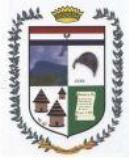 Tiene un campo cuartelado en cruz. En el primer cuartel se observa la silueta del cerro de la vieja, con nubes tormentosas según la leyenda y un paisaje que da a conocer el entorno de Chinácota. En el segundo aparece se observa el casco del conquistador Ambrosio Alfinger, con la indicación del año de su muerte según el Fray Pedro Simón, cronista de dicha época, que fue cuando se inició su transformación de asentamiento indígena en pueblo conquistado. En el tercer cuarte está la choza de los indígenas "Chinácotas" de la tribu de los Chitareros, que significa el origen precolombino de Chinácota y también de las Chítaras y de los Chitareros, representadas en una calabaza en forma de botella y una en forma de totuma, vasijas que los naturales llamaban `chítaros, en las que contenían el brebaje de maíz y yuca. Por eso los españoles le dieron el nombre de los Chitareros. En el cuarto cuartel un pergamino sobre un fondo verde (color de las Faz) que representa la firma del tratado de Paz tras la guerra de los mil días que fue firmada en Chinácota el 21 de noviembre de 1902. Sobre el cuartelado una franja con la bandera de Chinácota. Sobre la bandera, una corona que es una característica de la Chinácota moderna. Al lado y lado del campo dos ramitas unidas por una banda con la leyenda identificadora del escudo "El Valle de Ambrosio... hoy Chinácota", una de café (que entró a Colombia por Chinácota a principios del siglo XIX, con sus frutos que es el principal producto y significa la riqueza de la tierra) y la otra de olivo (que significa la paz y que también simboliza la aspiración de libertad).